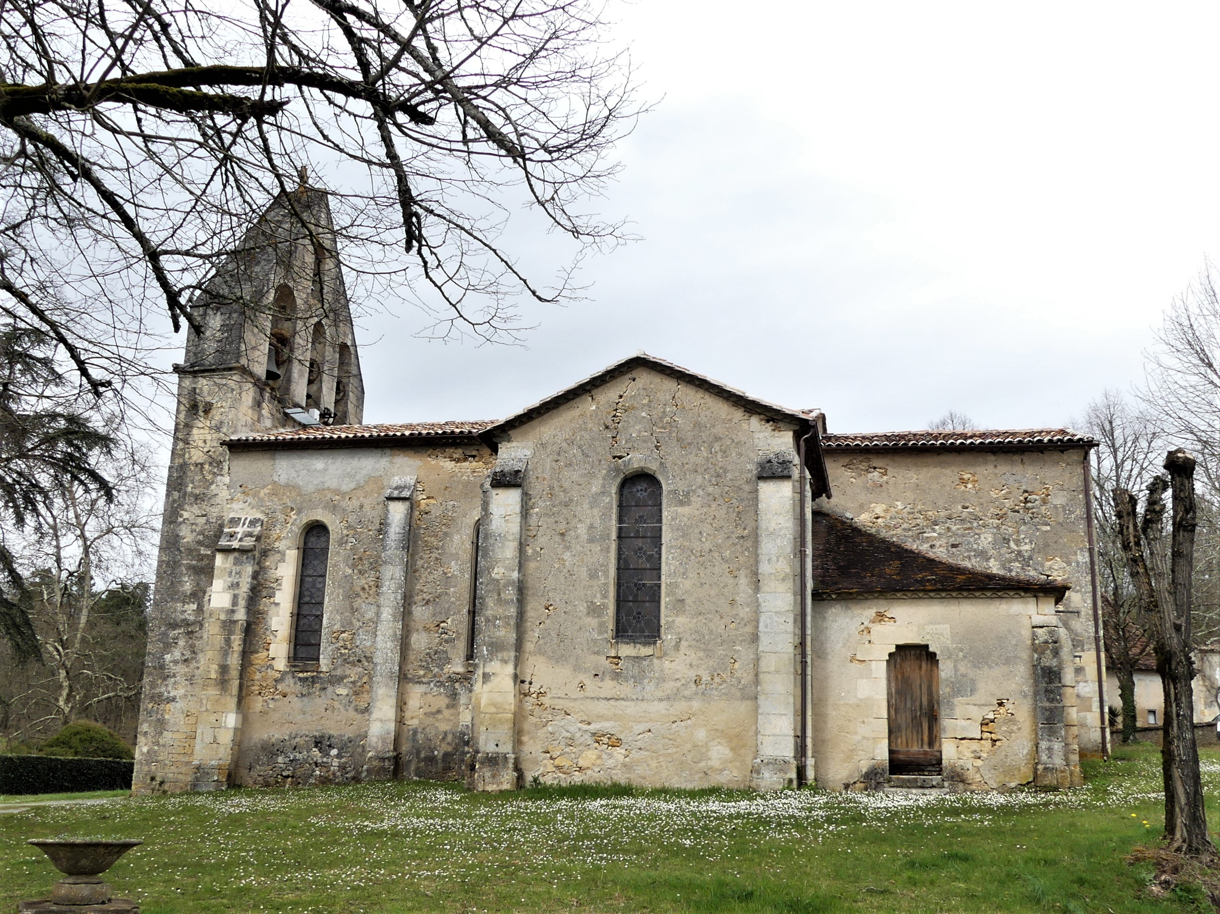 L'église d'Église-Neuve-d'Issac, Dordogne, France.